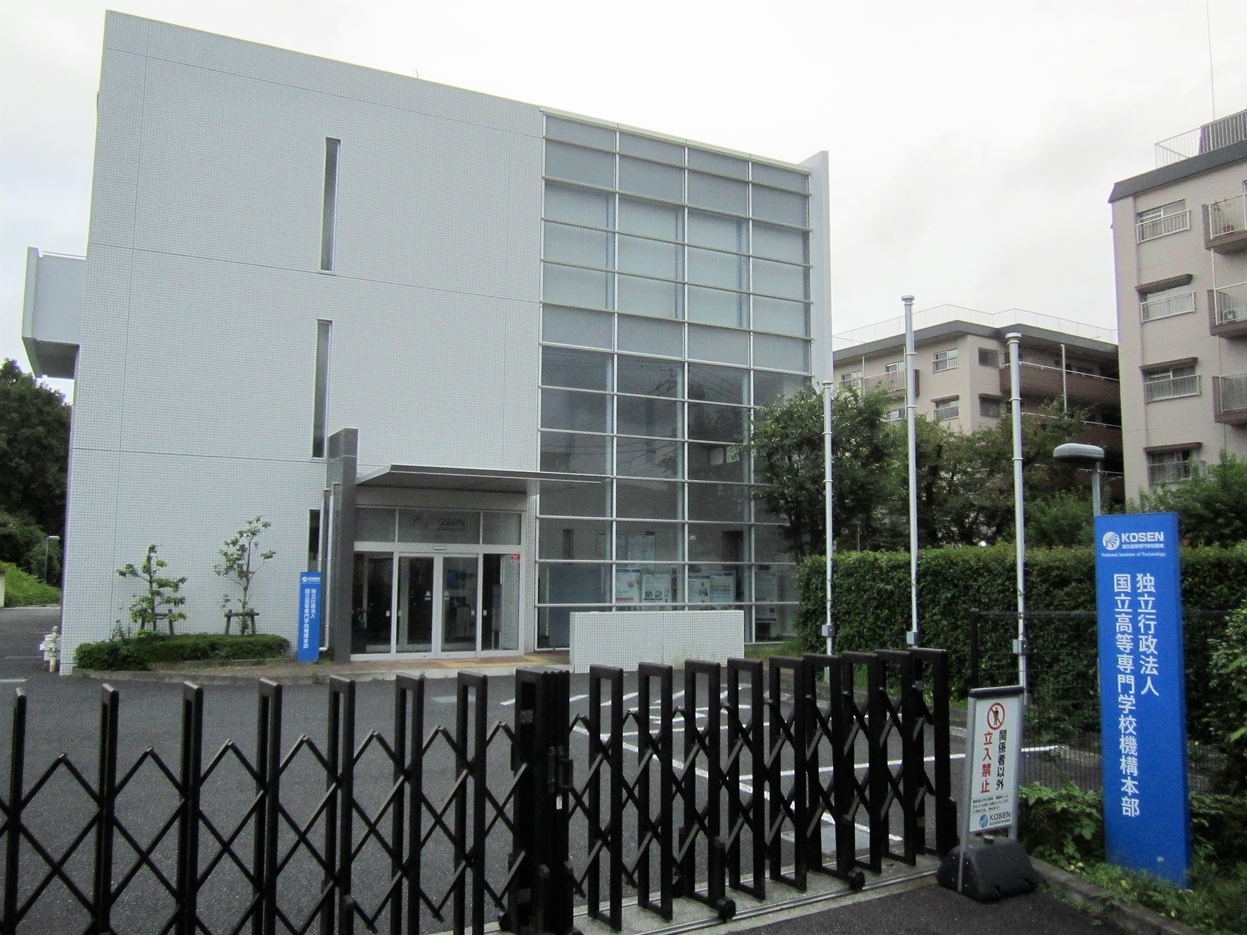 独立行政法人 国立高等専門学校機構 本部（八王子市東浅川町）